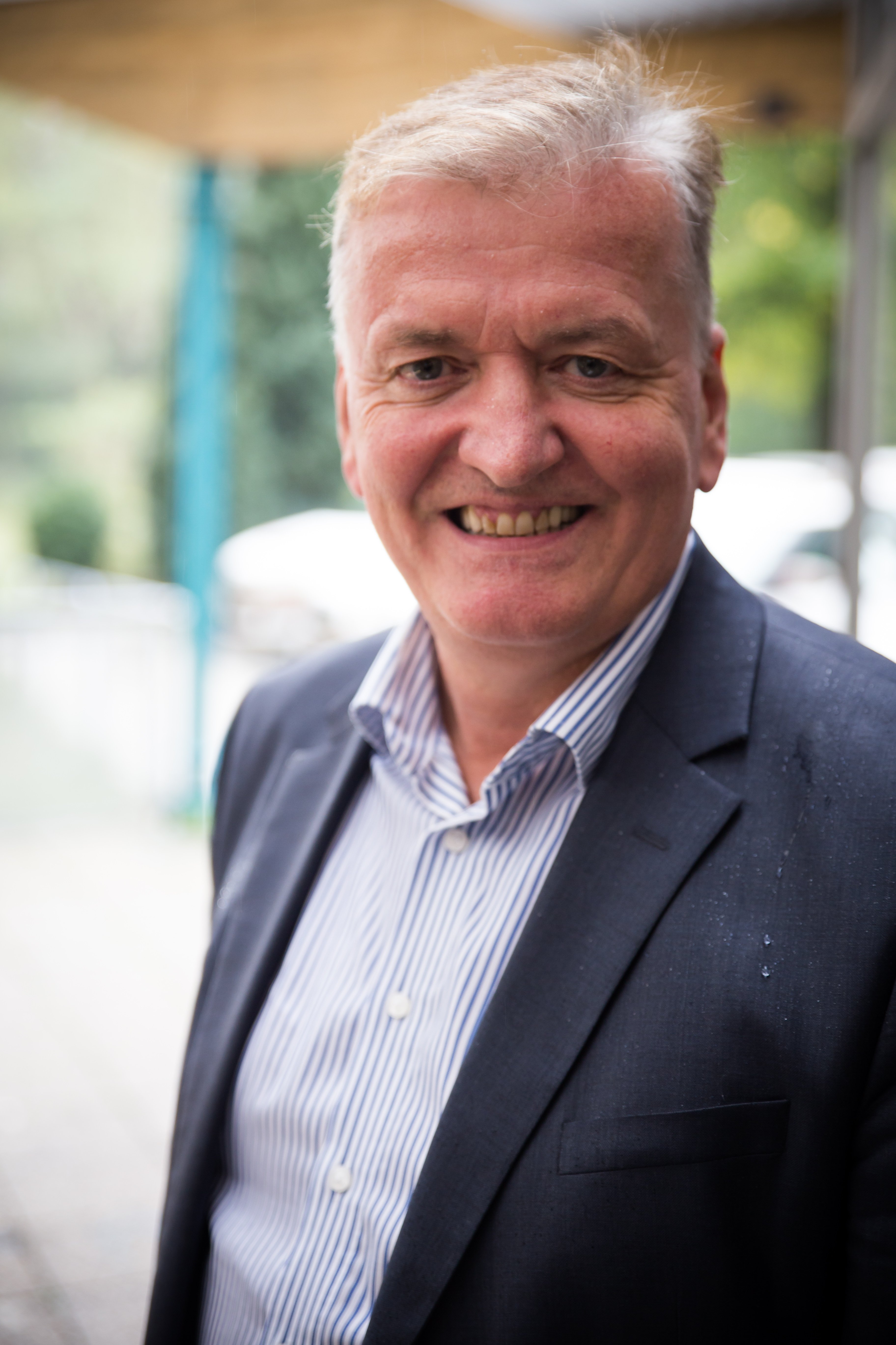 Franz Schnabl, Präsident des Arbeiter-Samariter-Bund Österreichs